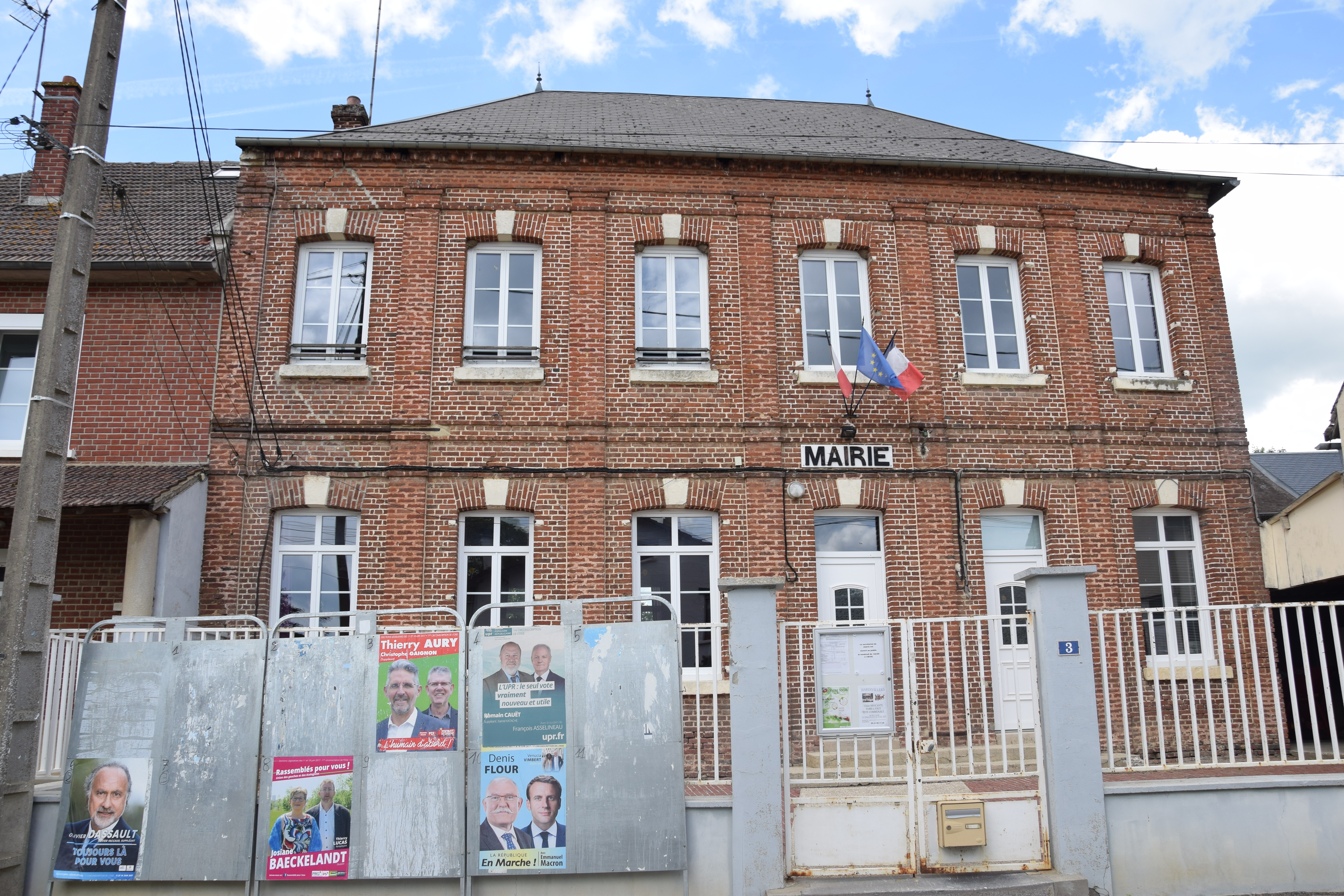 Troussencourt